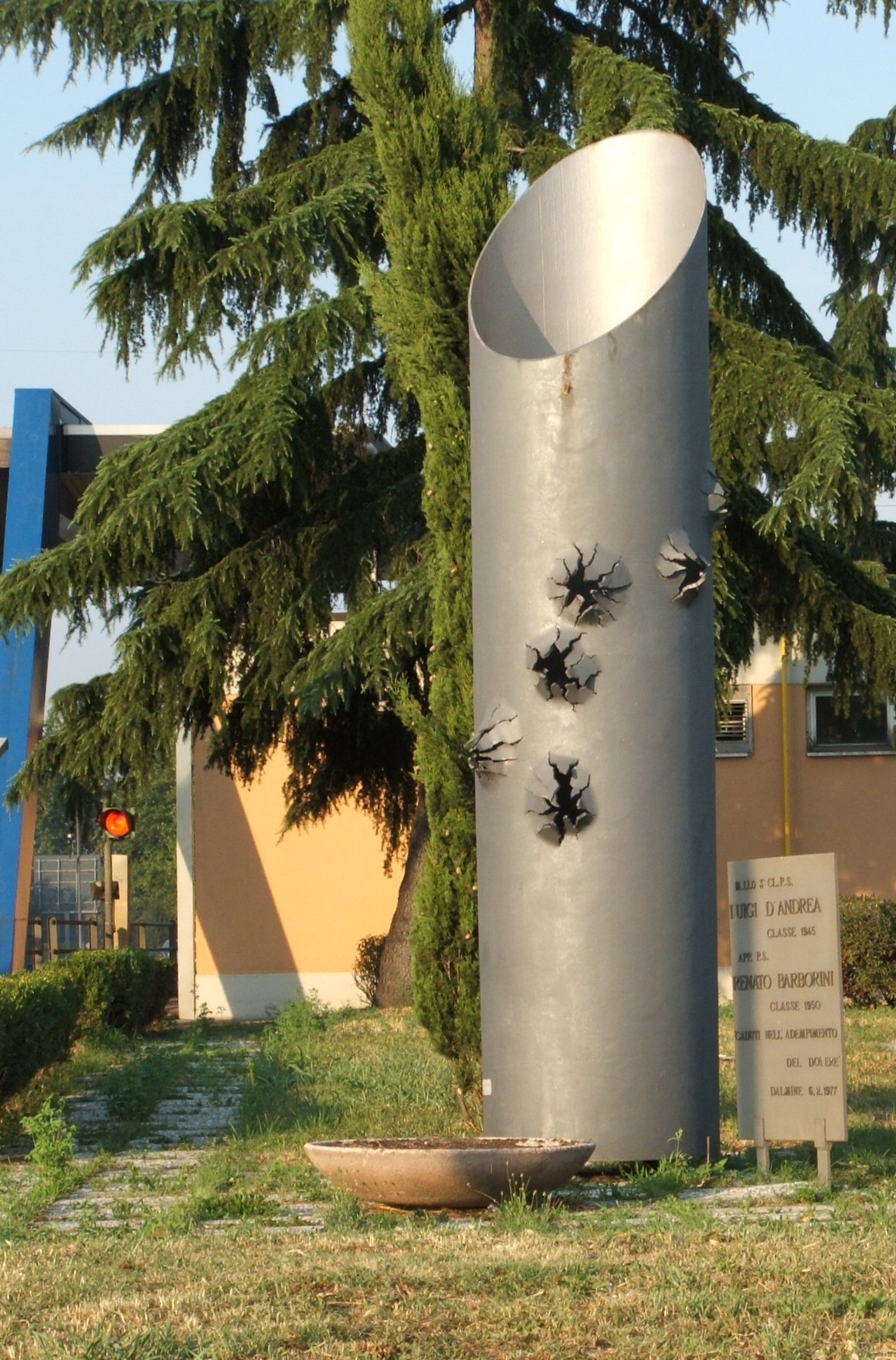 Dalmine (BG), Italia - monumento alla memoria dei poliziotti Luigi D'Andrea e Renato Barborini uccisi dalla banda Vallanzasca al casello autostradale di Dalmine nel 1977